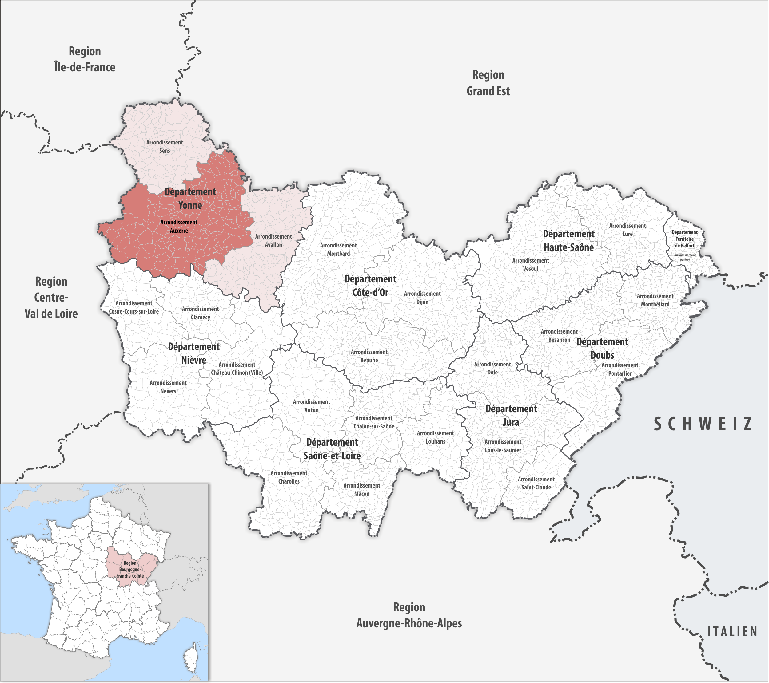 Lage des Arrondissements Auxerre